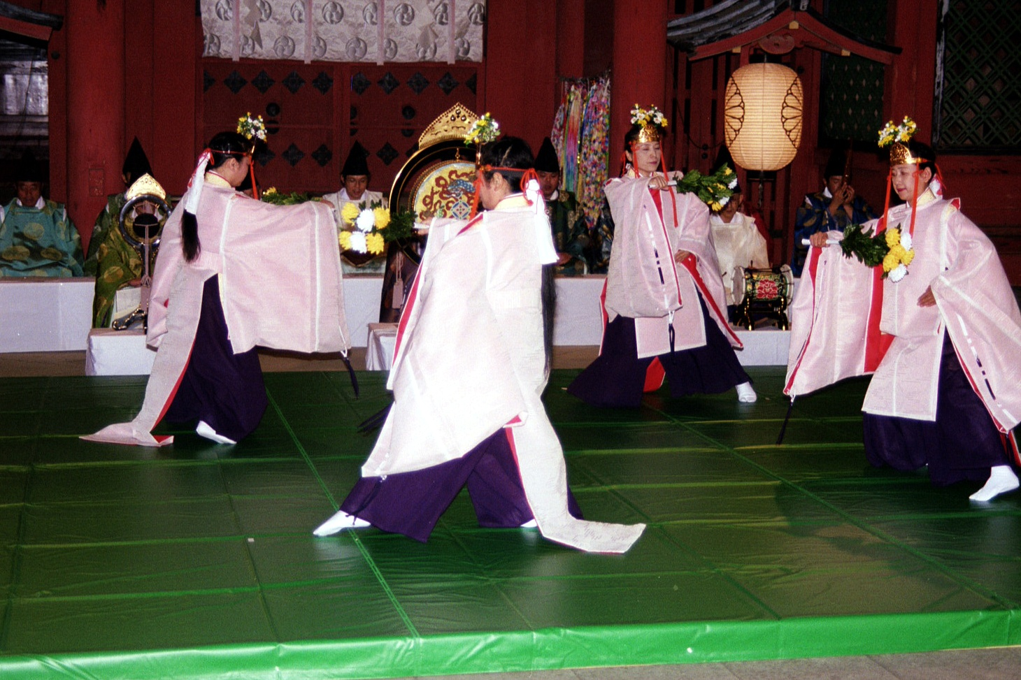 悠久の舞(近代に作られた神楽) Yukyu-no-mai(miko dance)